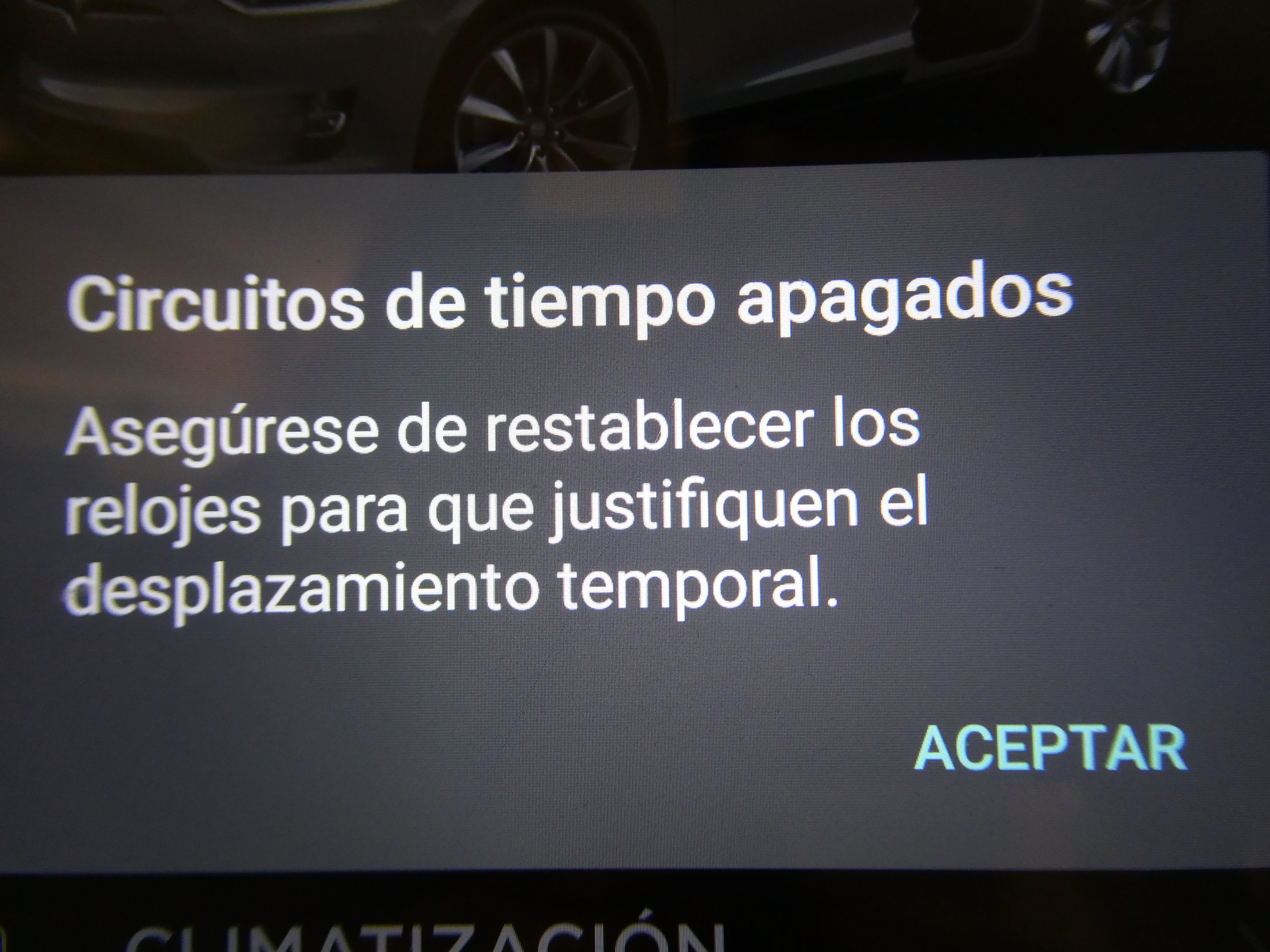 Cuadro de salida del huevo de Pascua Outatime en la app Tesla.